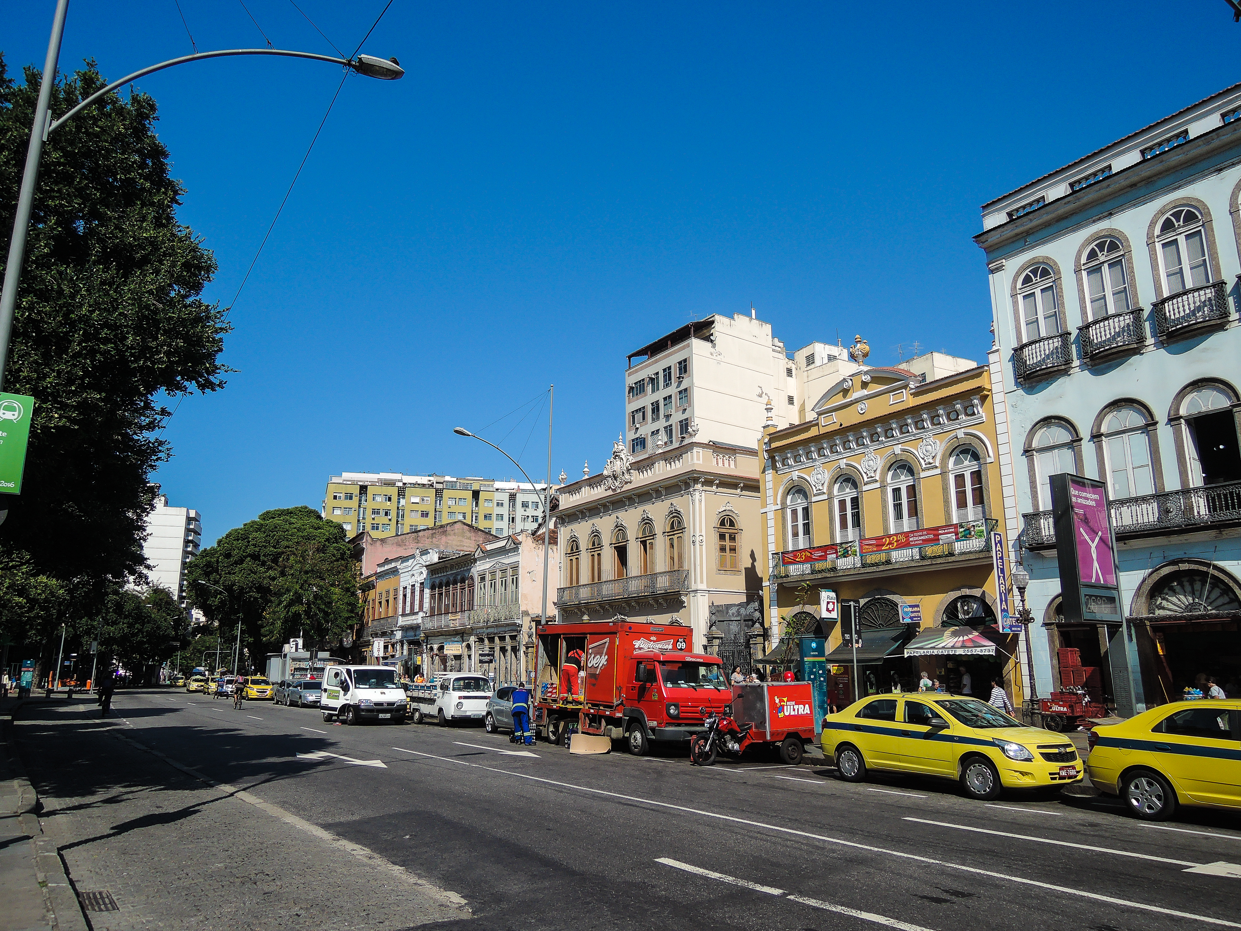 Palácio do Catete, parque e Rua do Catete: conjunto arquitetônico